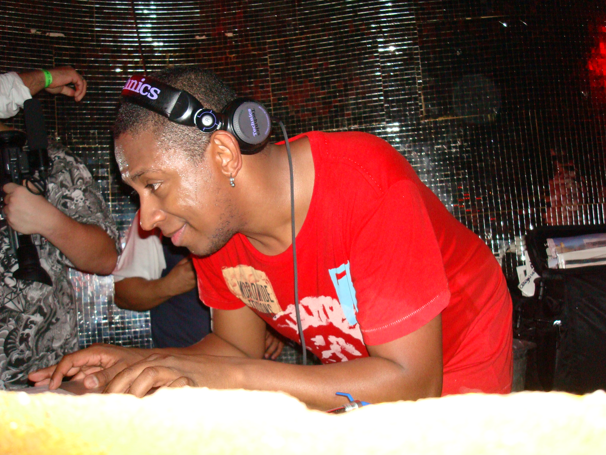 DJ Marky at Lov.e Club & Lounge (São Paulo - Brazil)